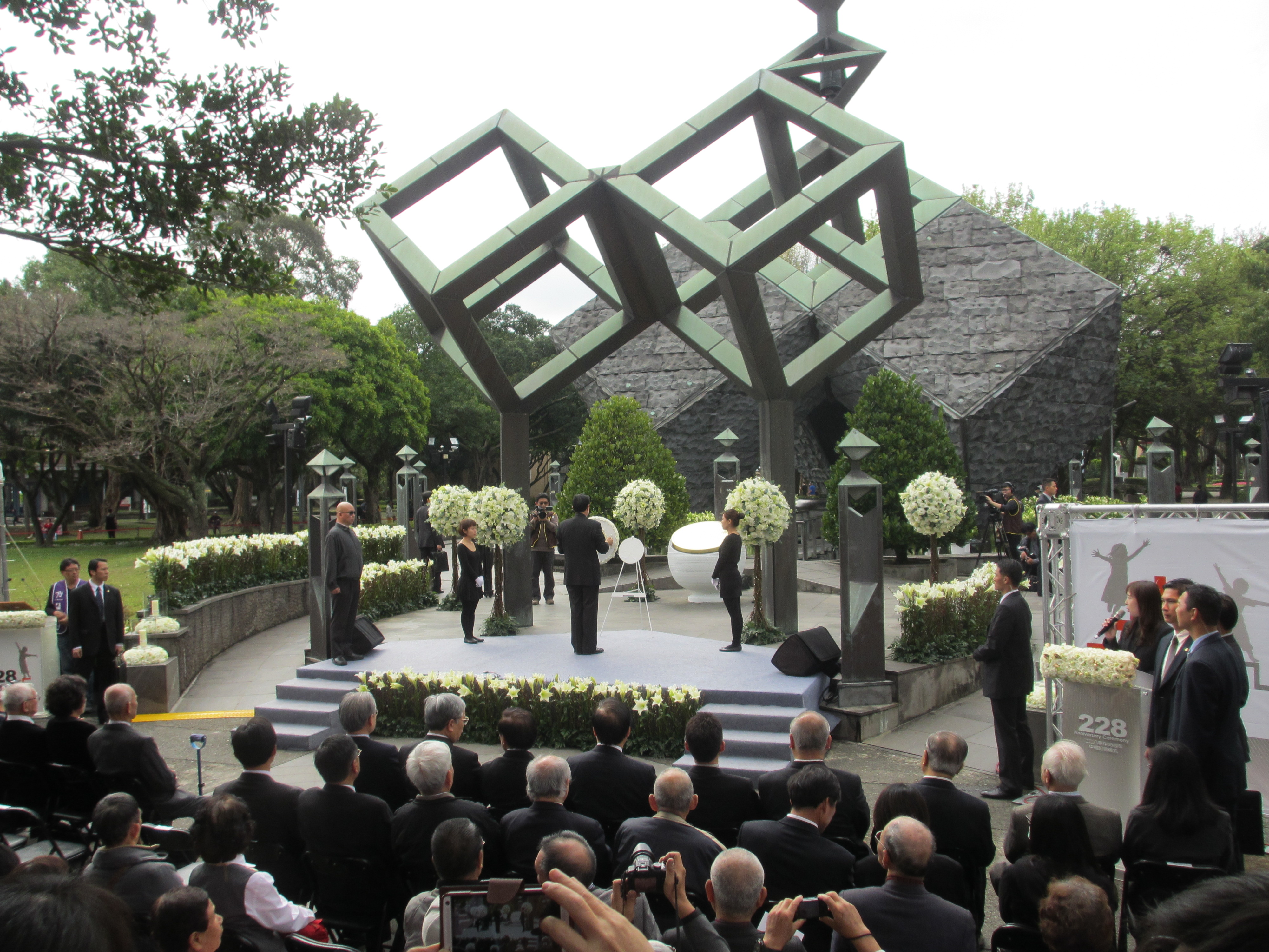 中文（台灣）: 台灣政府舉行228事件中樞紀念儀式（美國之音張永泰拍攝）